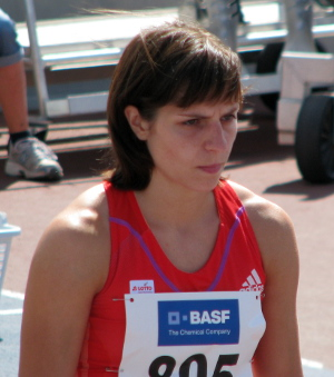 Nadine Hildebrand beim Olympia-Qualifikationswettkampf 2012 im Stadion der MTG Mannheim.